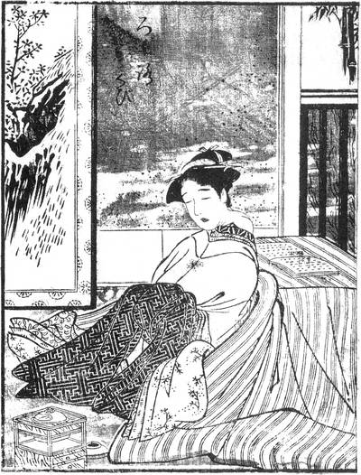 Rokurokubi (ろくろ首) from the Rekkoku-kaidan-kikigaki-zōshi (列国怪談聞書帖)